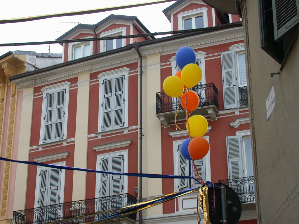 Alessandria, Piemonte, ItaliaCloured baloons